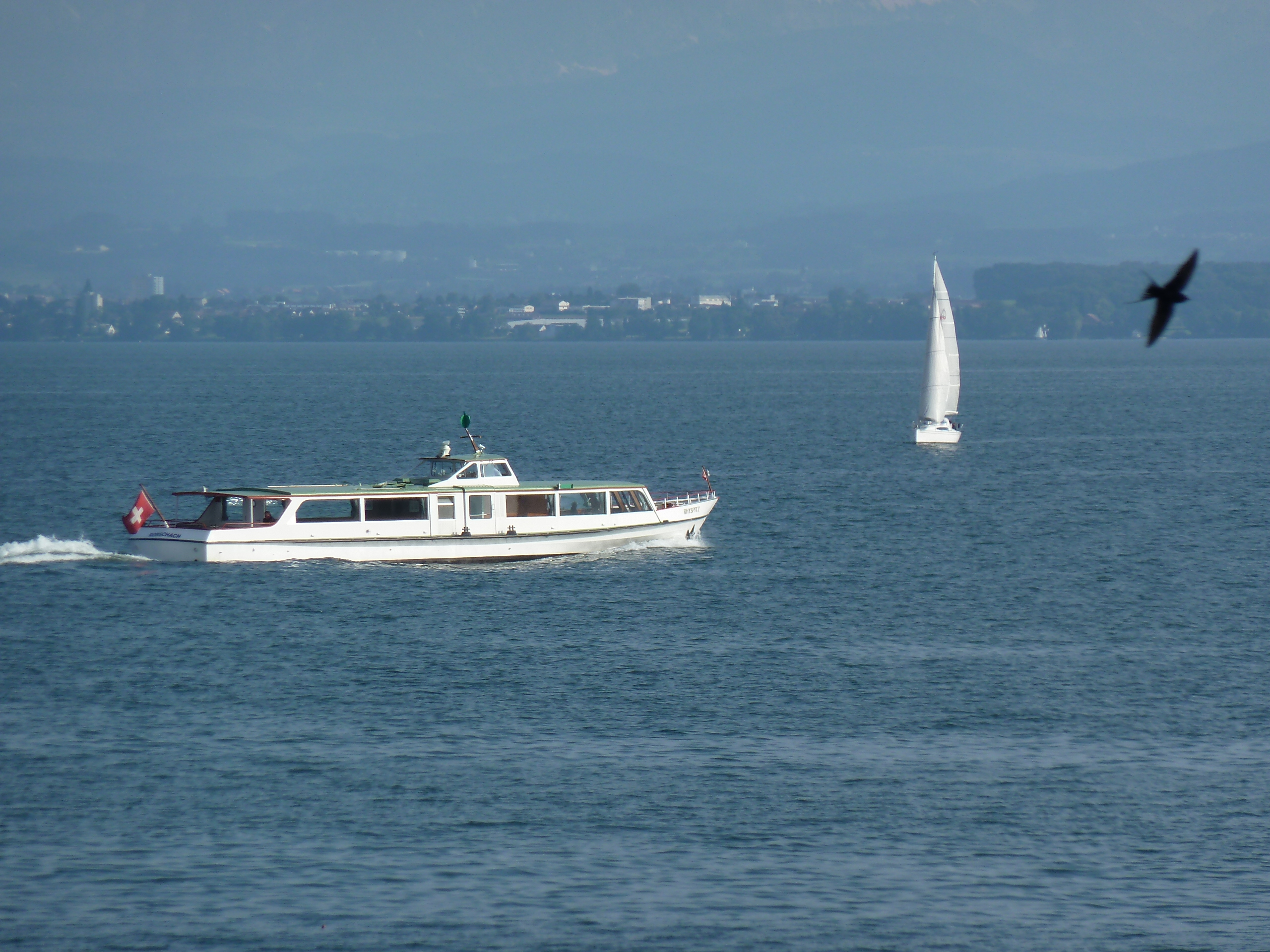 Die Rhyspitz auf Kurs Altnau - Immenstaad - Hagnau.